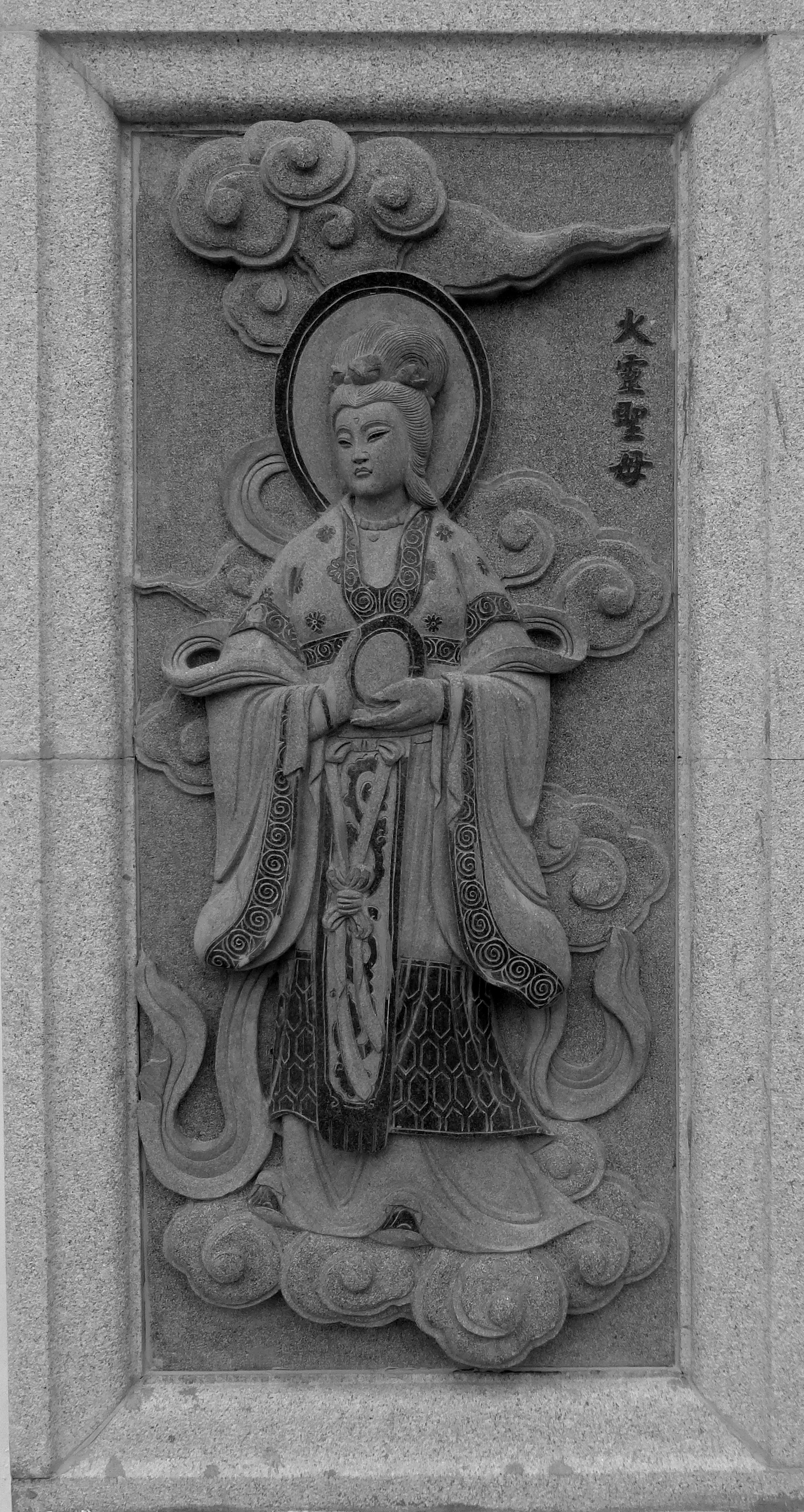 056 Huo Ling Shengmu, Investiture of the Gods at Ping Sien Si, Pasir Panjang, Perak, Malaysia Photograph from the Ping Sien Si Temple in Perak, Malaysia taken by Anandajoti.